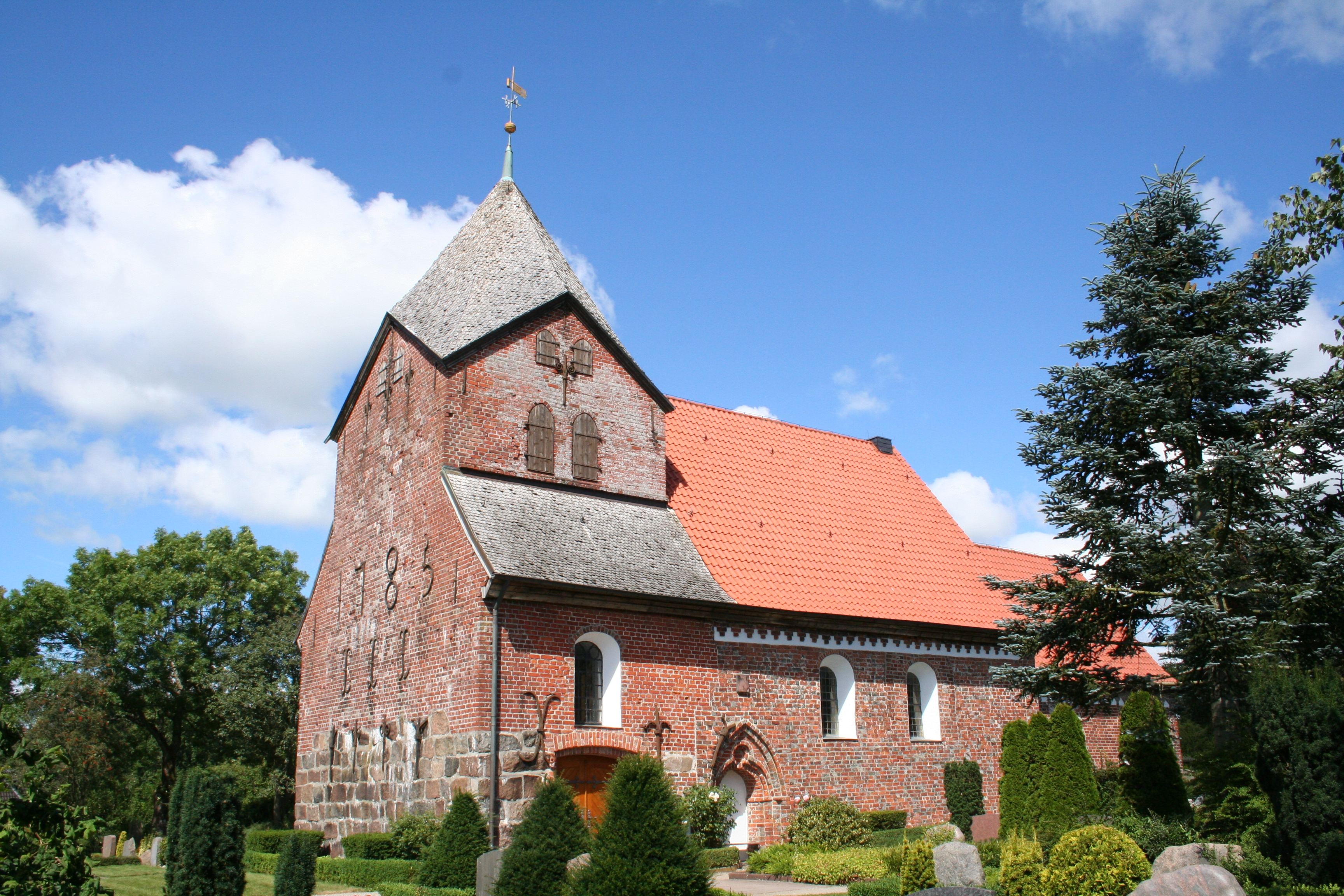 Kirchlein am Meer, Schobüll, Husum (von Südwest) This is a photograph of an architectural monument.